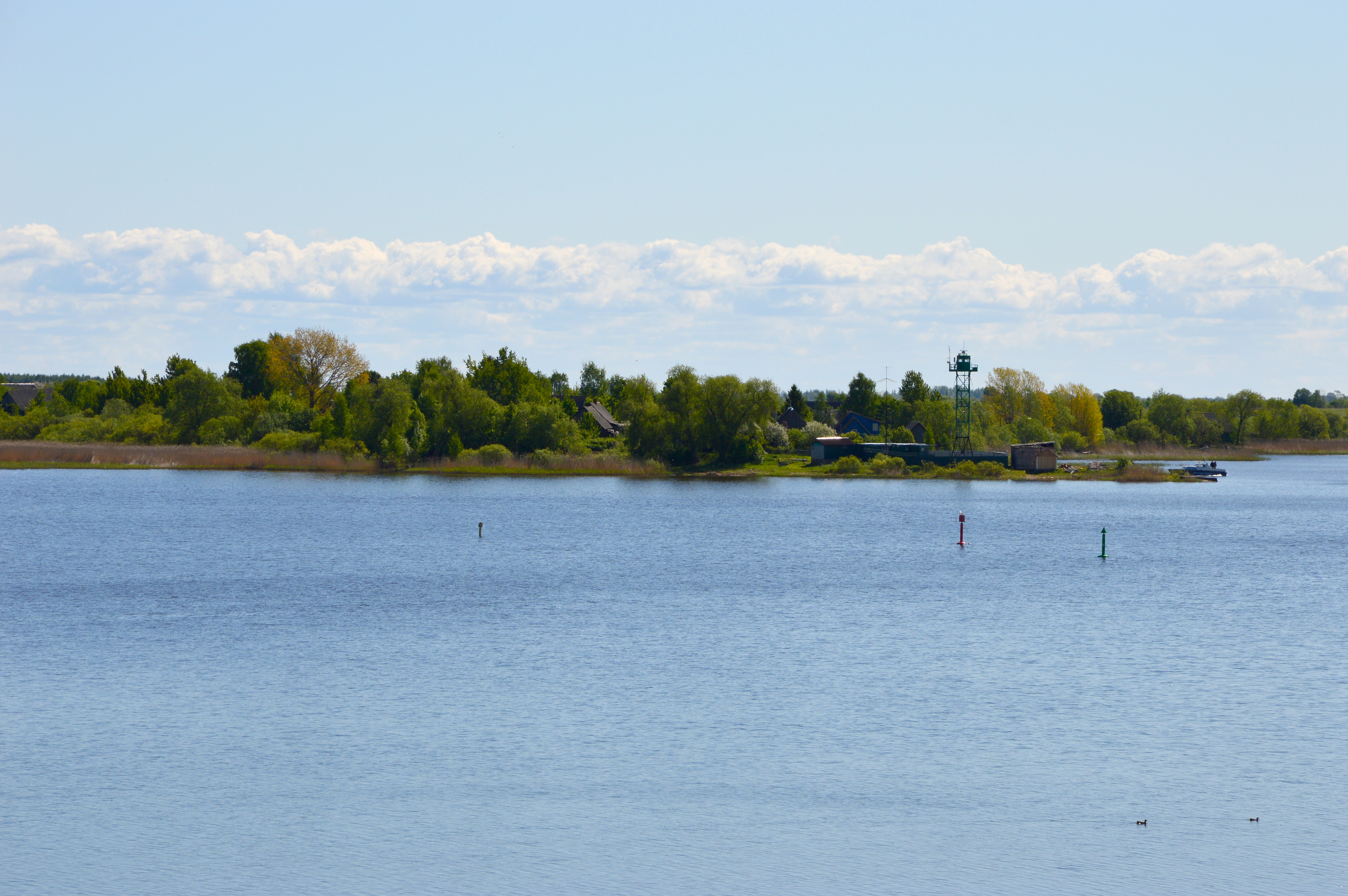 Kolpino saar Lüübnitsa küla poolt.